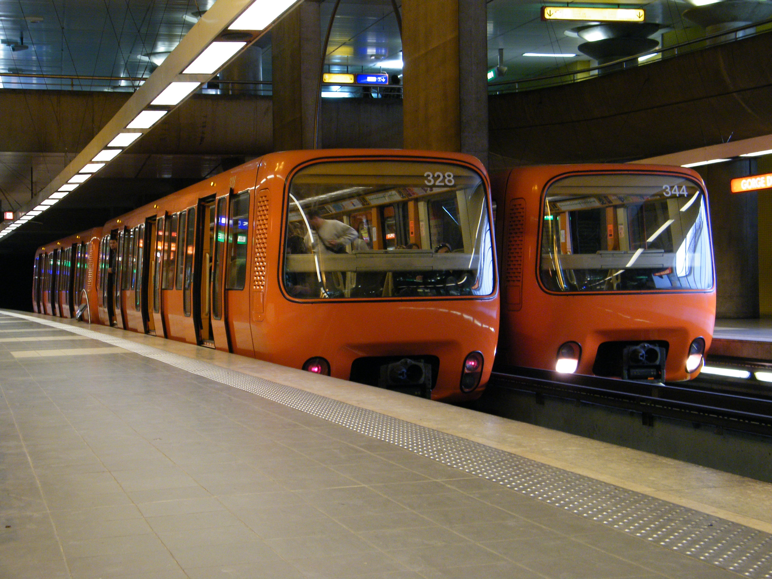 A la station Gorge de Loup, voie 2. Deux rames en arrêt suite à un incident technique.